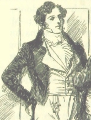 « Portrait » de Mr Knightley (détail de l'illustration le montrant debout dans la salle de bal, chapitre 2 du tome III).